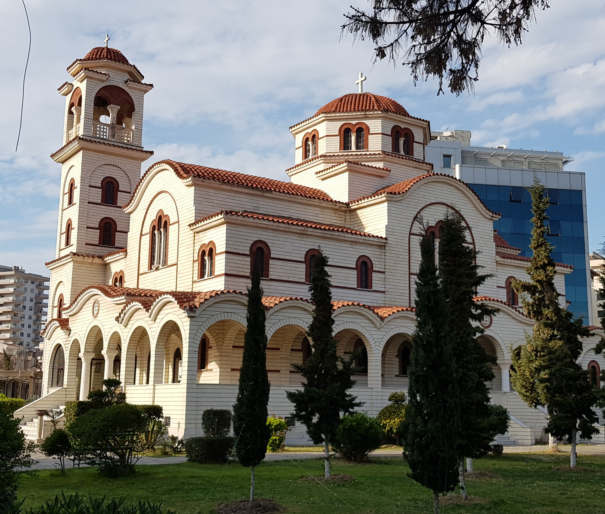 Durrës (Albanie) - Eglise de l'Apôtre Paul et de Saint Asti